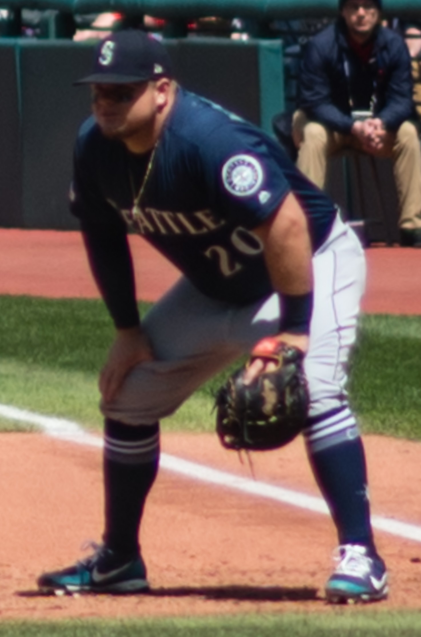 Seattle Mariners VS. Cleveland Indians